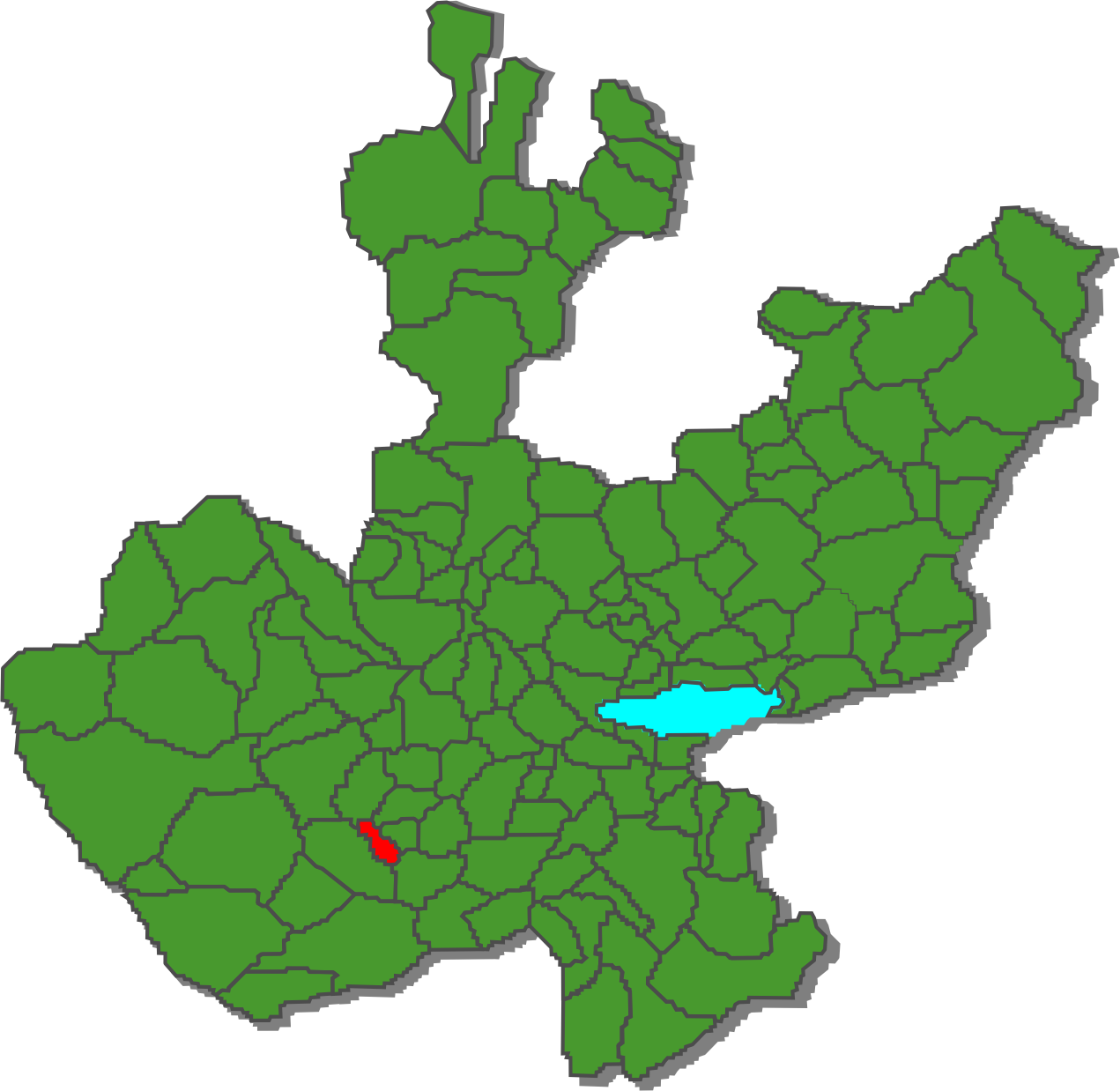 Mapa de ubicación del municipio "El Grullo" en Jalisco.